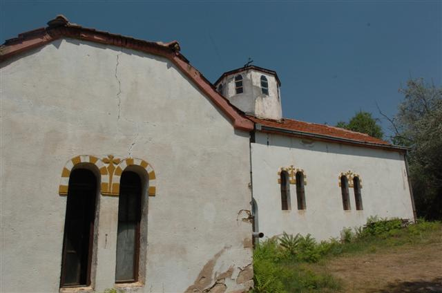 Главната манастирска црква на Говрлевскиот Манастир